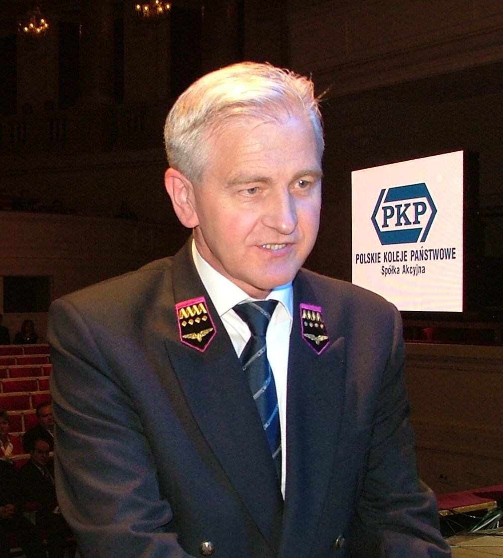 Centralne Obchody Święta Kolejarza 2007, Warszawa, Sala Kongresowa